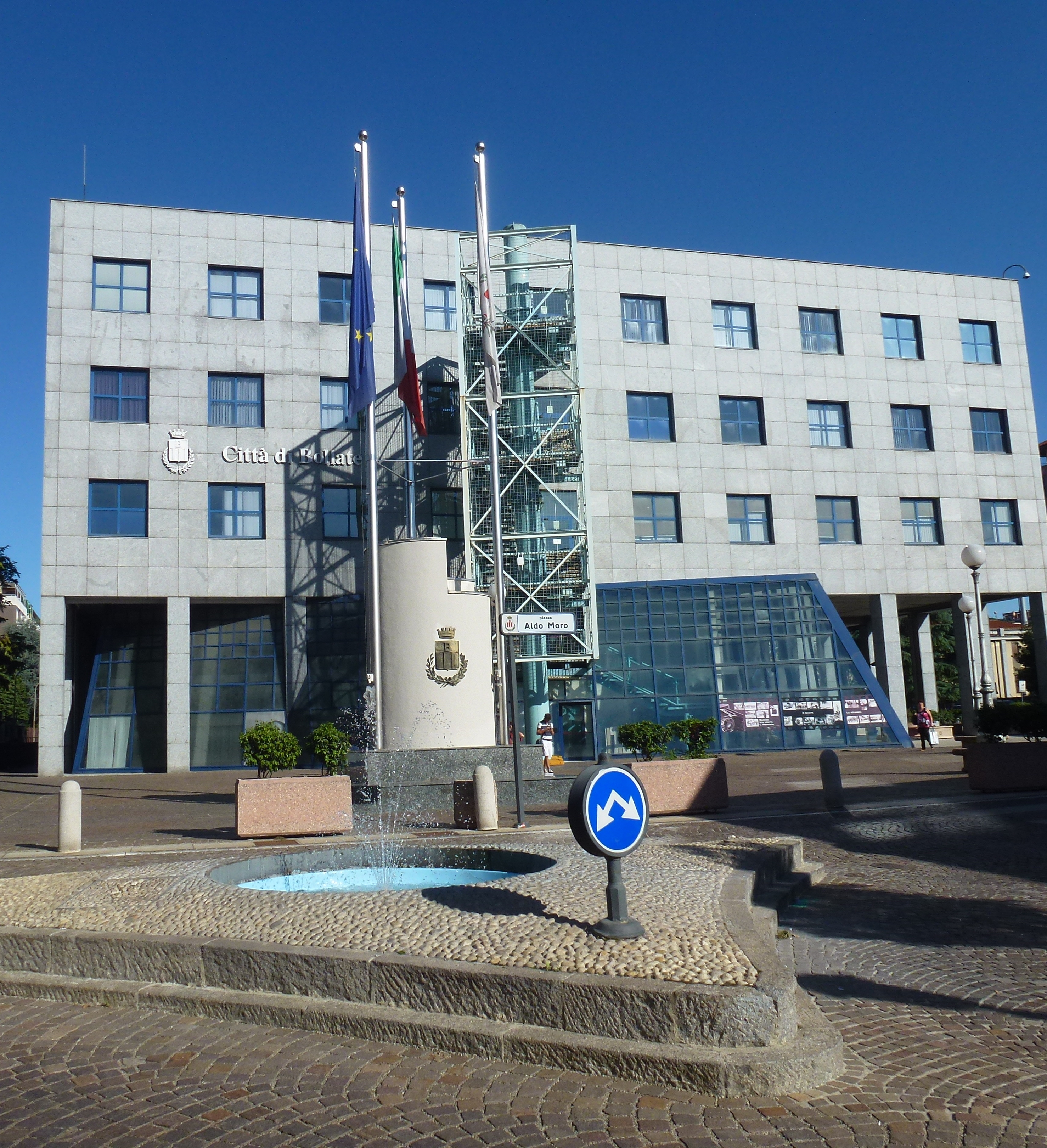 Palazzo Comunale Questo è il luogo pubblico d’incontro, da cui dipartono gli ascensori cilindrici, attraversato da una passerella sospesa al primo livello connessa alla scala di salita anticipata da una bussola coperta, pensata come una piccola architettura compiuta accolta da quella complessiva. Sul fronte principale un basamento geometrico composto da un cilindro a gradoni intonacato, sostenuto da gradoni di serizzo, (su disegno di Matteo Vercelloni) funge da elemento portabandiere. Un edificio, si legge nella relazione di progetto, “che pur non essendo stato pensato come struttura flessibile al variare delle esigenze, manifesta il suo contributo alla formazione di un nuovo paesaggio urbano con un’immagine precisa e solida, emergente dal punto di vista del manufatto architettonico dall’insieme della geografia edilizia dell’intorno”. MATTEO VERCELLONI This is a photo of a monument which is part of cultural heritage of Italy.